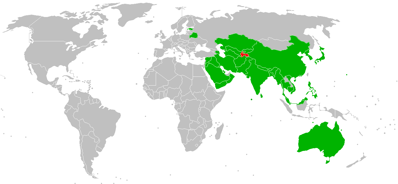 Соперники национальной сборной Таджикистана